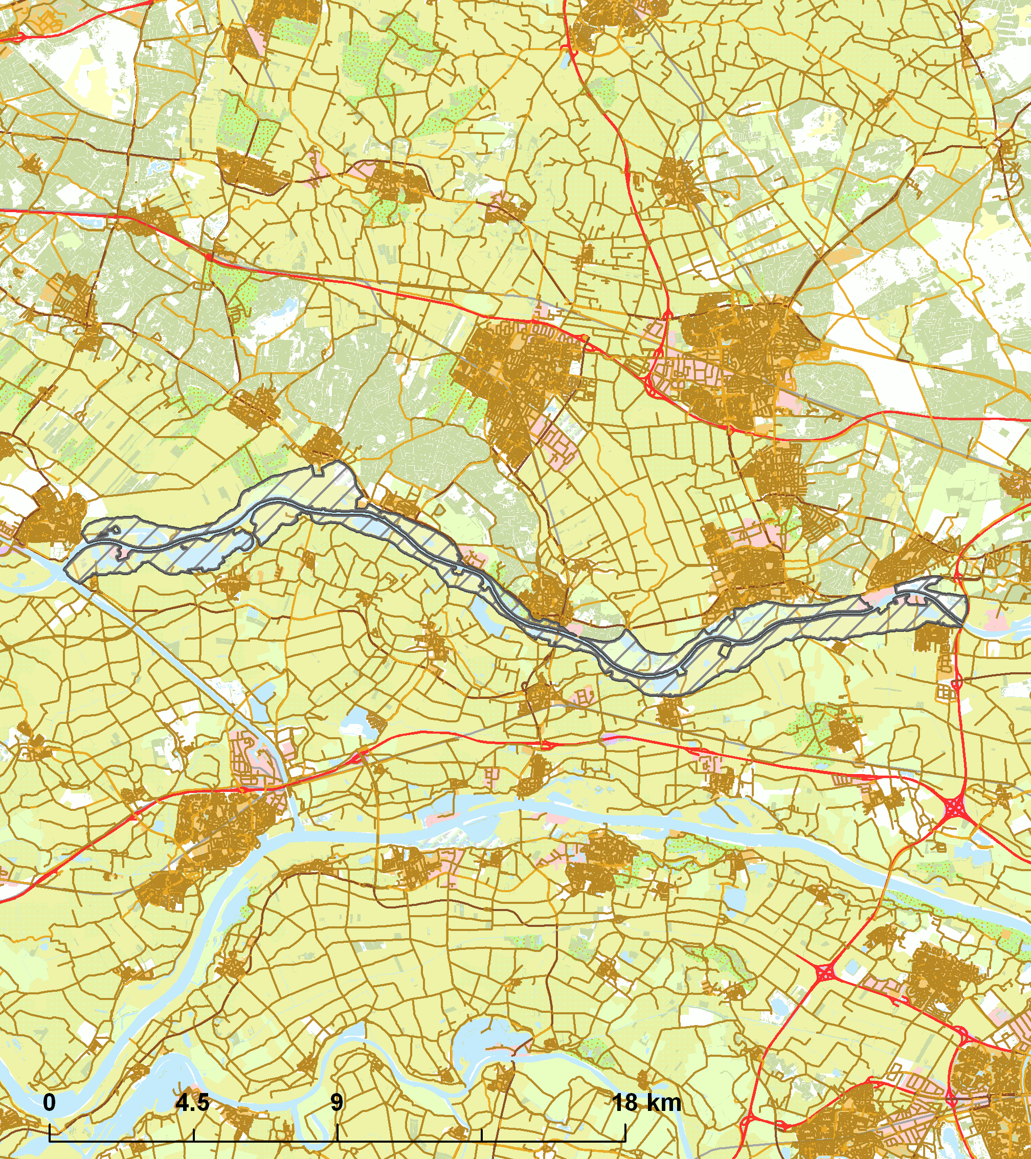 Natura2000 - Uiterwaarden Neder-Rijn.png